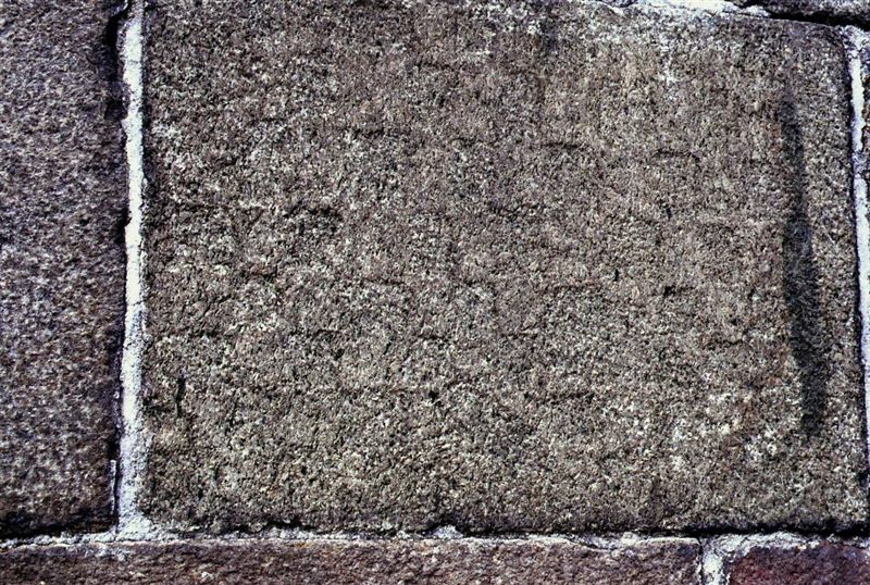 Farsø Kirke i Danmark. Korets sydmur, skaktavlkvader